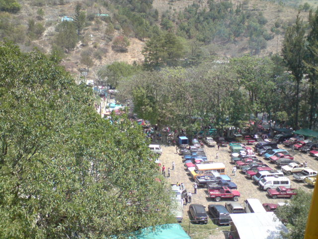 Parqueo frente al Ríos San Juan en día festivo